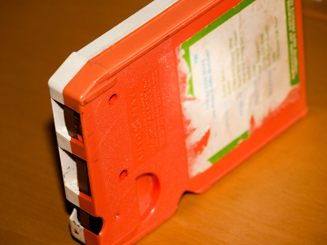 Cartucho áudio laranja